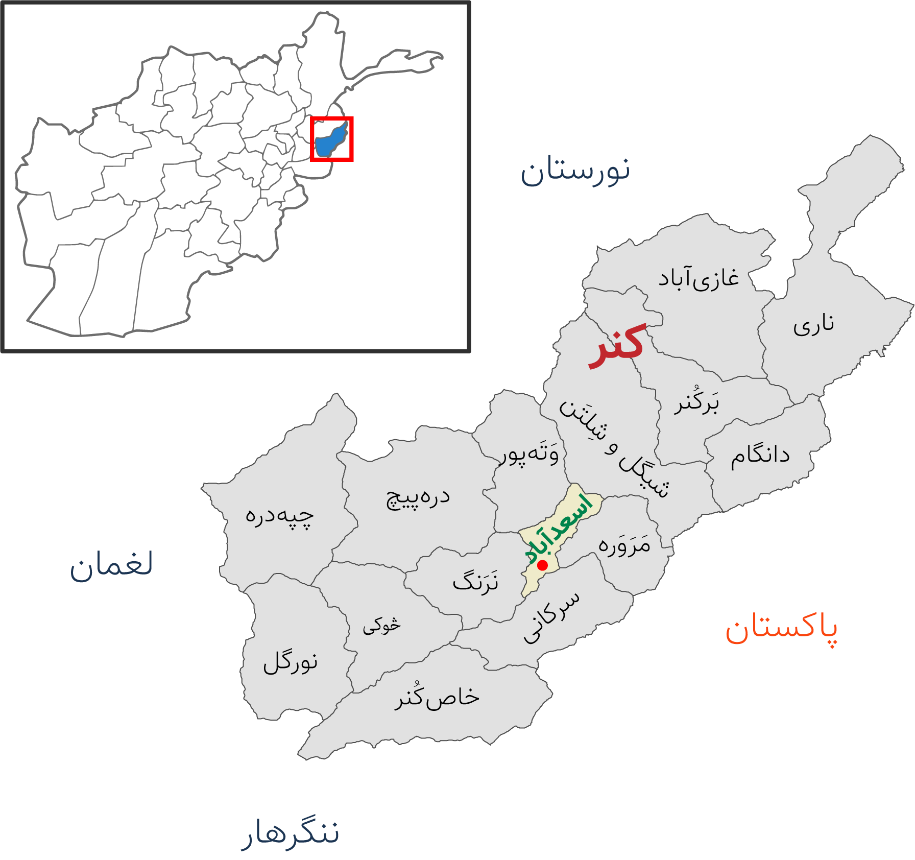 نقشه ولایت کنر